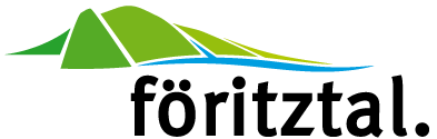 Das Logo der Gemeinde Föritztal. Es zeigt grafisch den stilisierten Thüringer Wald, den Fluss Föritz sowie den Schriftzug "föritztal."